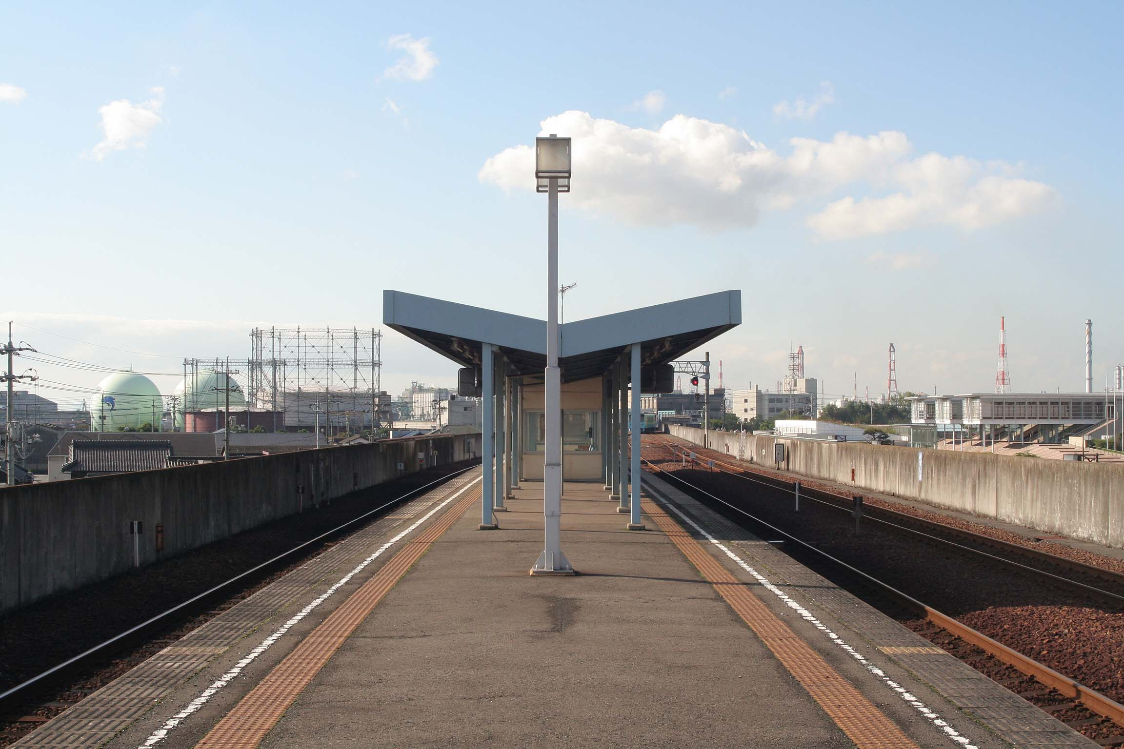 水島駅の構内